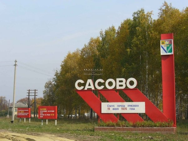 Сасово